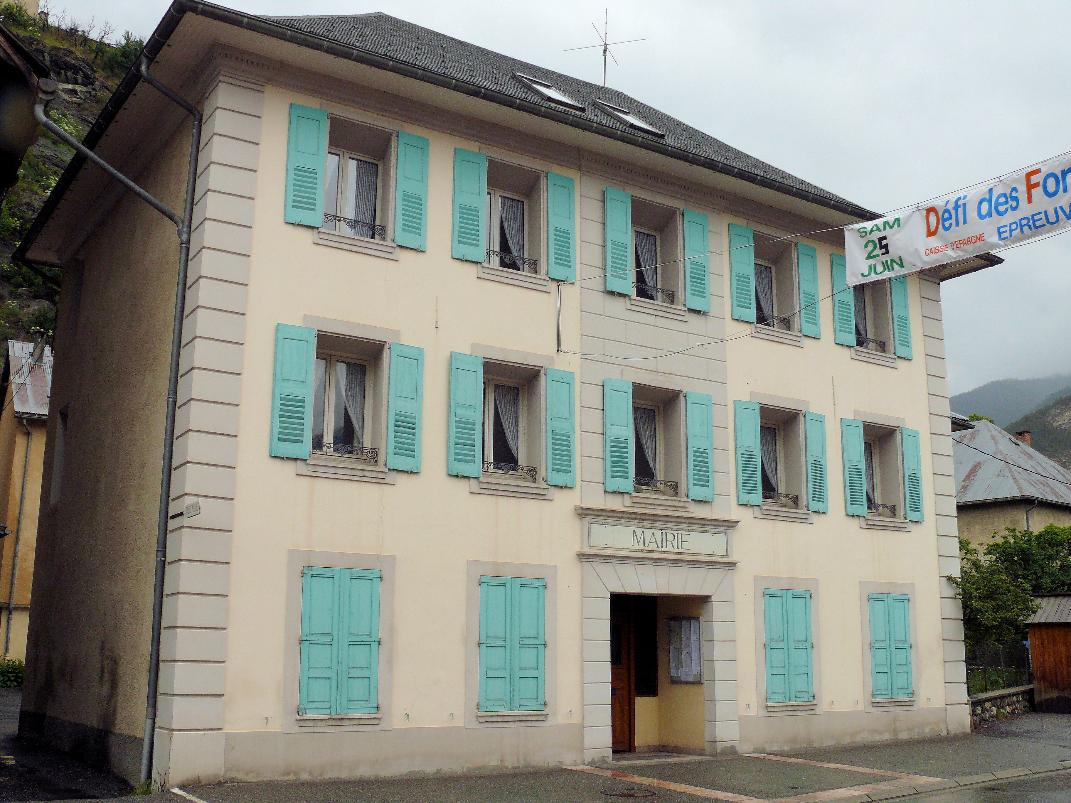 Jausiers - Mairie